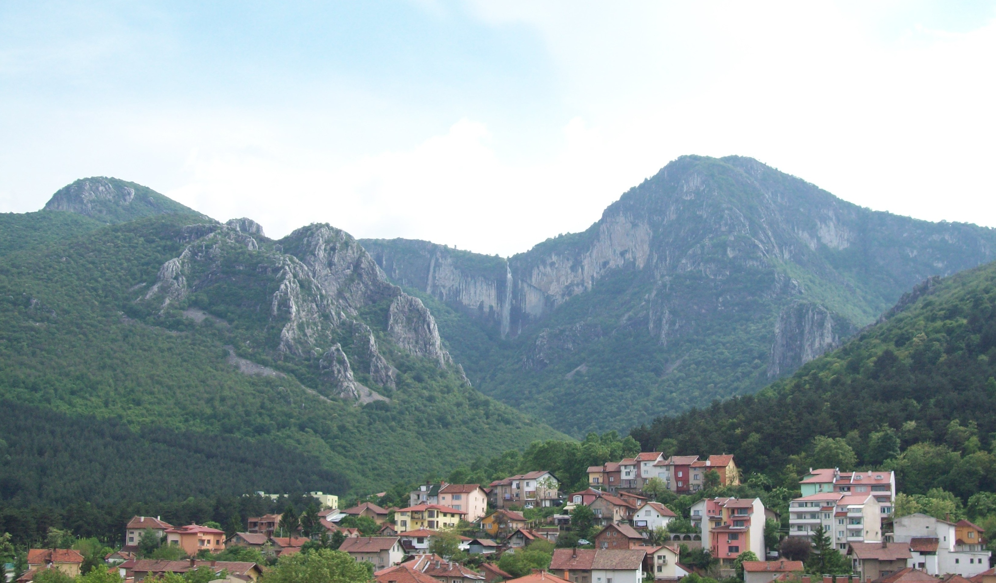 Водопада "Скакля"